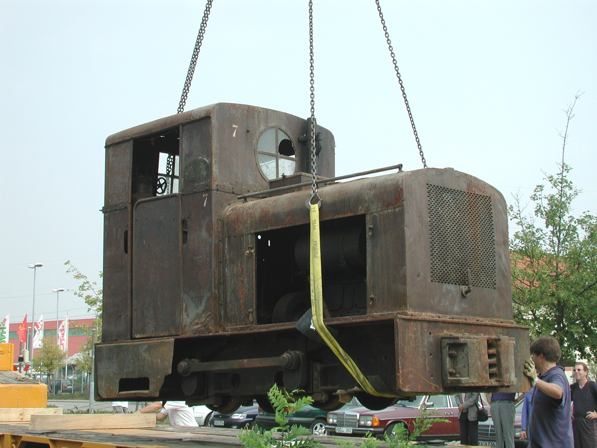 Deutz OMZ am Haken Bj. 1935, 36 PS Rohölmotor, Gesamtgewicht 7,8 to, Spurweite 600 mm Bauart: B-dm (Stangen), Länge: 3800 mm, Breite: 1600 mm, Höhe: 2600 mm, Achsstand: 1150 mm, 4 Fahrstufen: 3,3 km/h - 6,0 km/h - 10,4 km/h - 17,5 km/h. Der Start der Lokomotive erfolgt mit Hilfe von Pressluft Foto: Michael Linnenbach, GNU-FDL